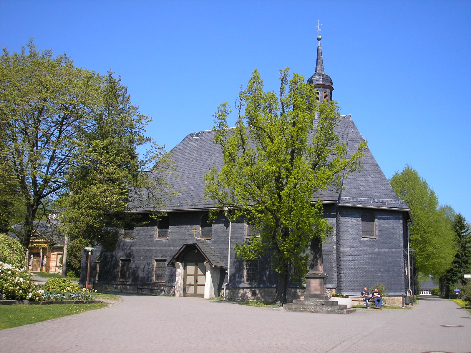 Die Kreuzkirche (Friedhofskirche) in Ilmenau (Thüringen).